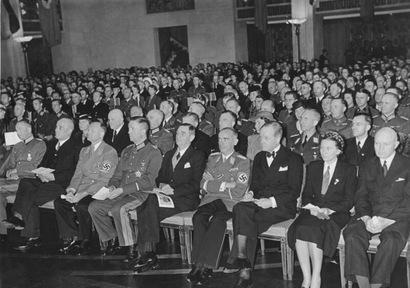 Berlin, 75. Geburtstag Mannerheim, Feier Feierstunde anläßlich des 75. Geburtstages des Oberbefehlshabers der finnischen Armee Feldmarschall [Carl Gustaf] Mannerheim im Haus der Flieger. UBz: die Ehrengäst von rechts nach links: dänischer Gesandter Exzellenz Mohr, Reichsfrauenfüherin Gertrud Scholtz-Klink, schwedischer Gesandter Exzellenz Richert, Reichssportführer v. Tschammer-Osten [Hans von Tschammer und Osten], Minister Ramsay, Generaloberst [Friedrich] Fromm, Präsident Dr. Hans Draeger, der finnische Gesandte Dr. [Toivo Mikael] Kivimäki und Generalfeldmarschall [Walther] v. Brauchitsch. Fot. Hoffmann 3.6.42 Abgebildete Personen: Brauchitsch, Walther von: Generalfeldmarschall, Oberbefehlshaber des Heeres, Deutschland (GND 116414855) Fromm, Friedrich: Generaloberst, Ritterkreuz (RK), Heer, Deutschland (GND 118843338) Draeger, Hans Dr.: Präsident der Nordischen Verbindungsstelle, Deutschland Kivimäki, Toivo Mikael Prof. Dr.: Botschafter in Deutschland, Finnland Scholtz-Klink, Gertrud: Reichsfrauenführerin, Deutschland (GND 119288192) Tschammer und Osten, Hans von: Reichssportführer, Präsident des Deutschen Olympischen Ausschusses, Deutscher Reichsbund für Leibesübungen, Deutschland (GND 117431257) Ganz rechts: Otto Carl Mohr (Dänischer Gesandter)